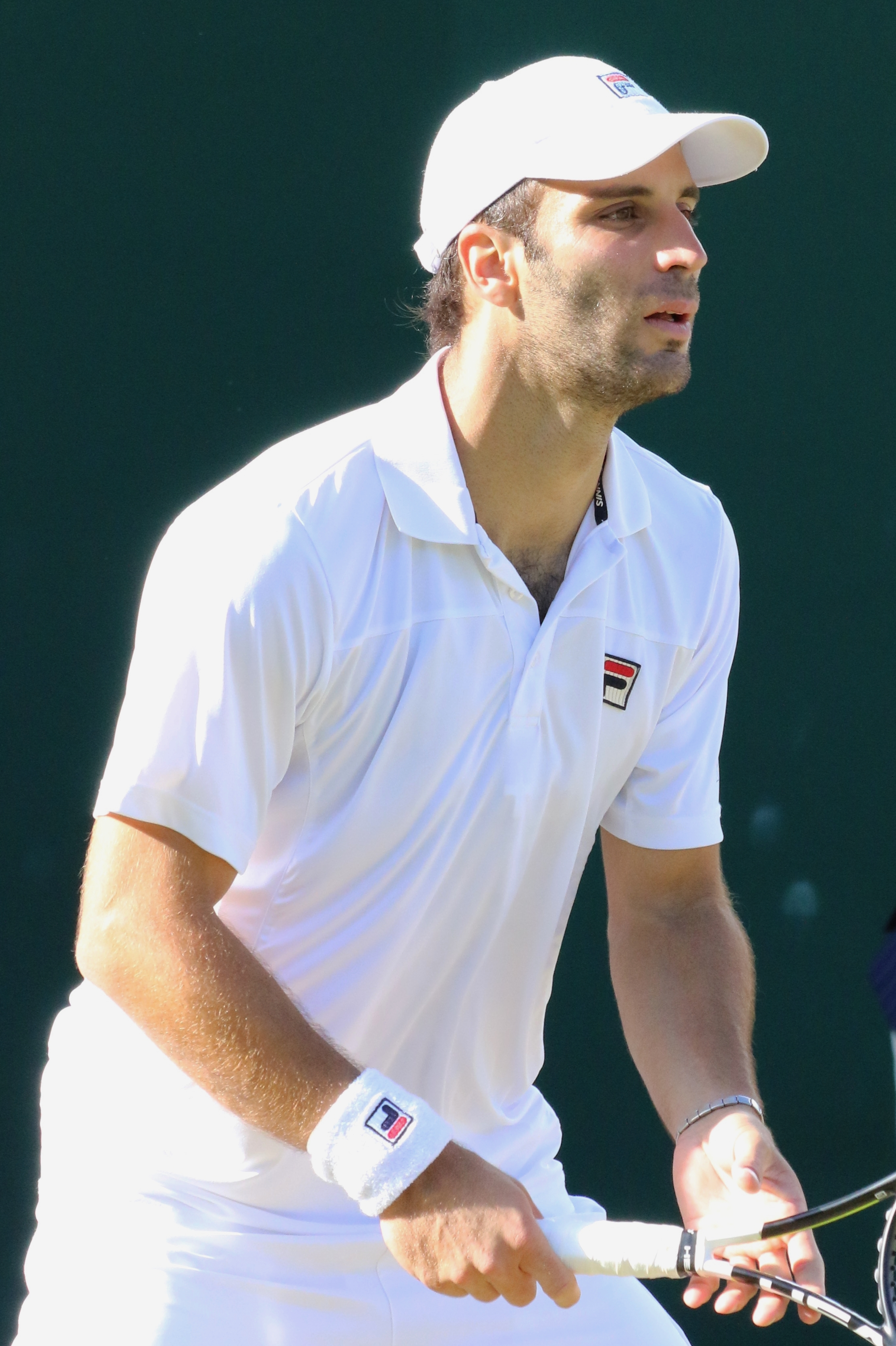 Duran WM16 (21)